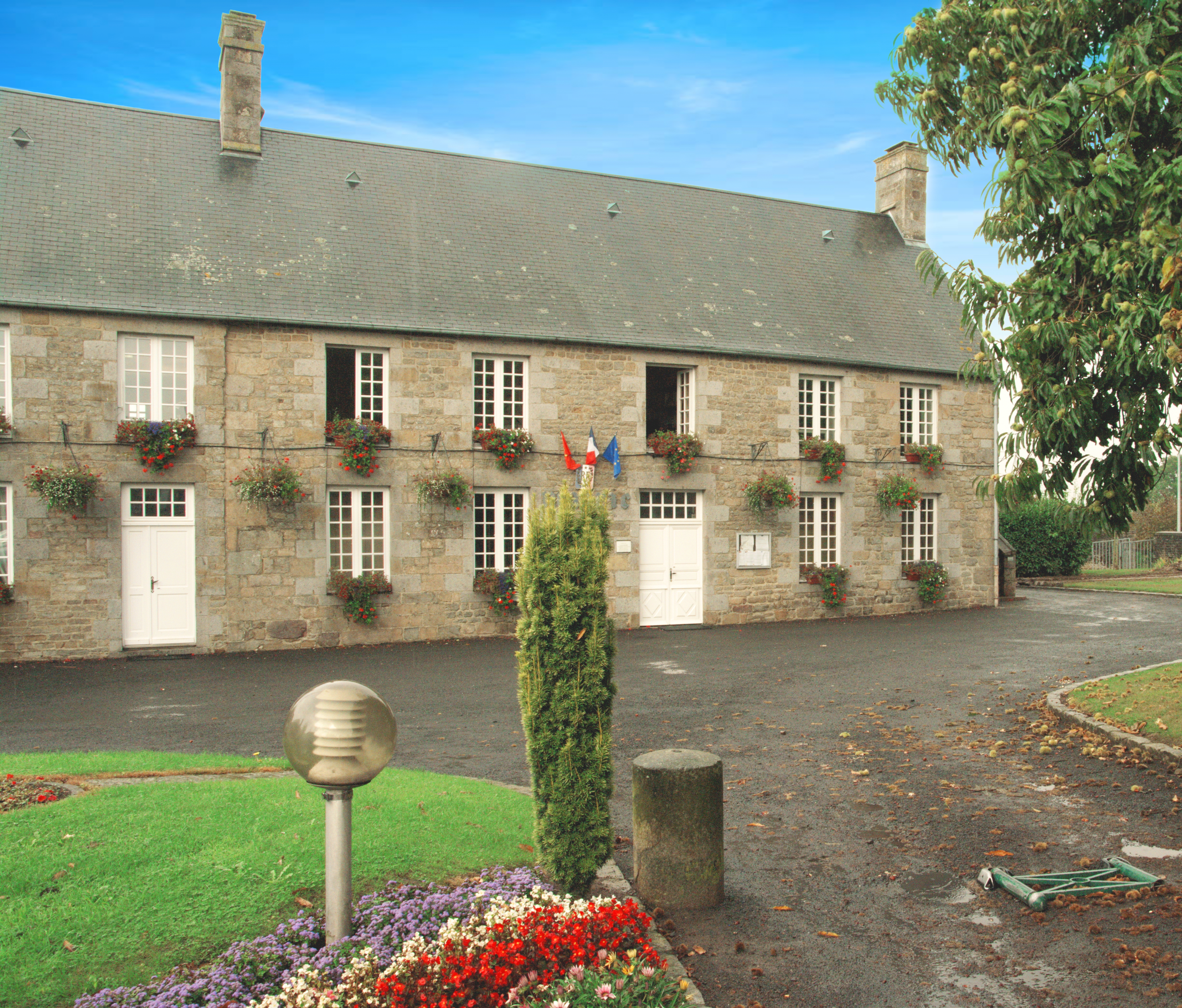 La Mairie du village de Chanu, département de l'Orne.